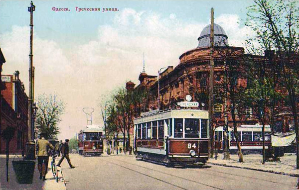 вул. Грецька 26 на розі із Рішельєвською - Будинок Бродського (тепер зруйнований)